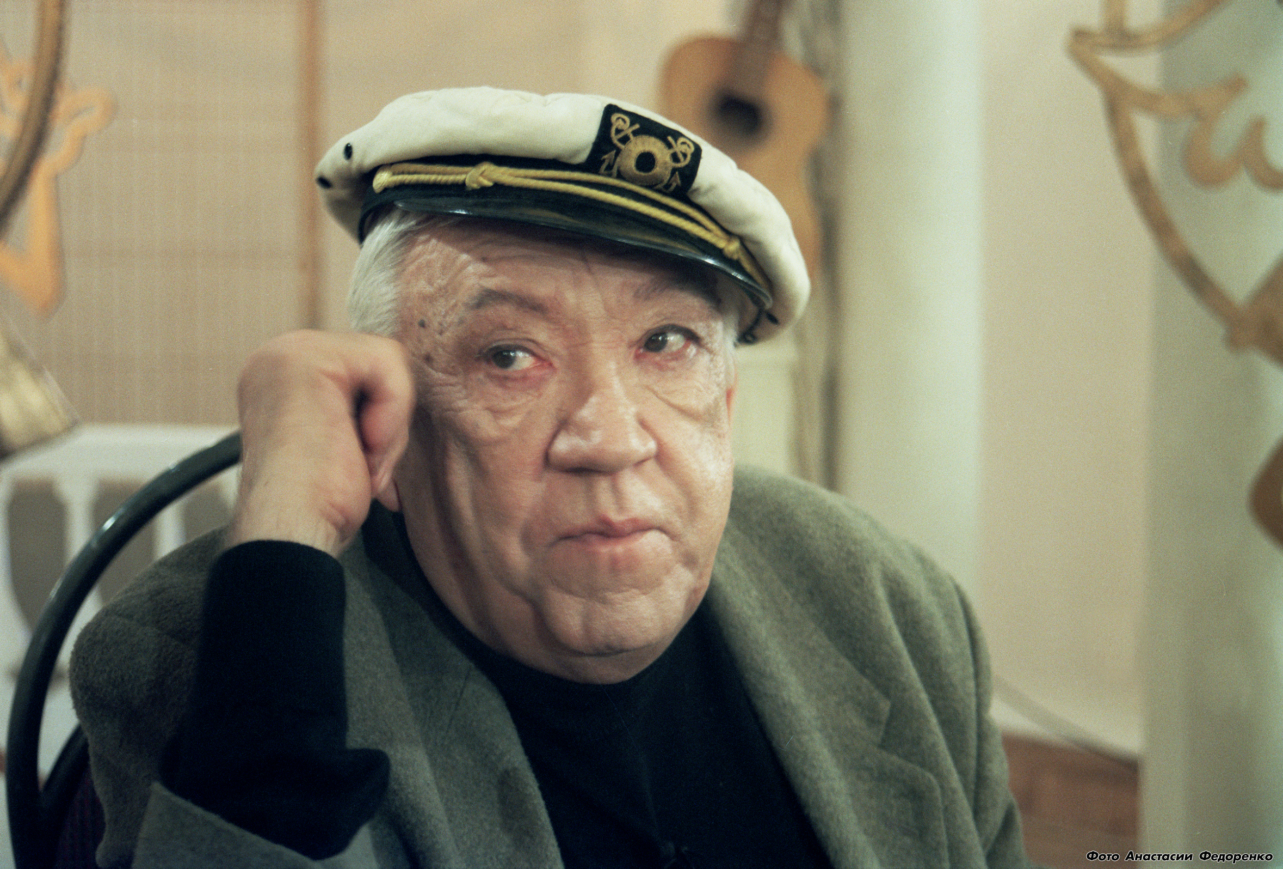 Юрий Никулин